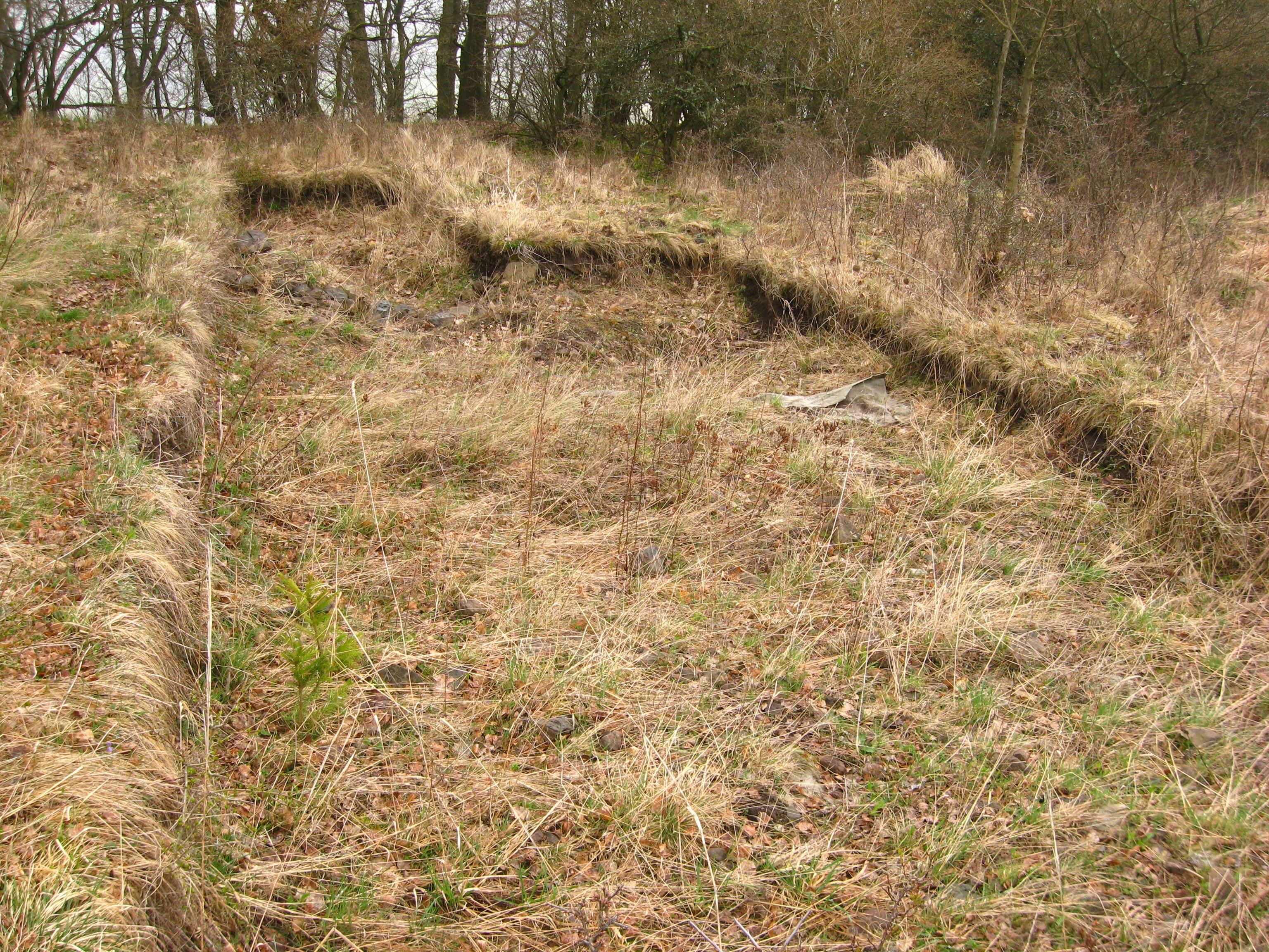 Výšinné opevněné sídliště - hradiště Vladař, archeologické stopy (Záhořice), Stolová hora, Záhořice